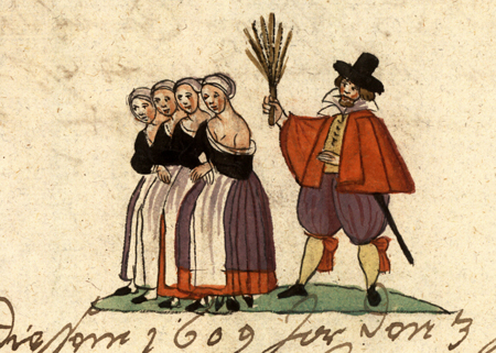 Vier Ehefrauen werden wegen Unzucht und Hurerei mit Ruten aus der Stadt getrieben, 3. Juni 1609. (Stadtarchiv Nürnberg F 1 Nr. 156 B. 364´)